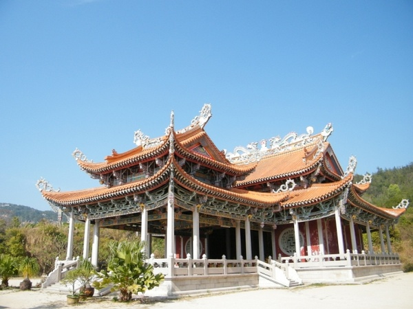 达濠东湖岭山脚 大峰祖师殿 2010.1.30